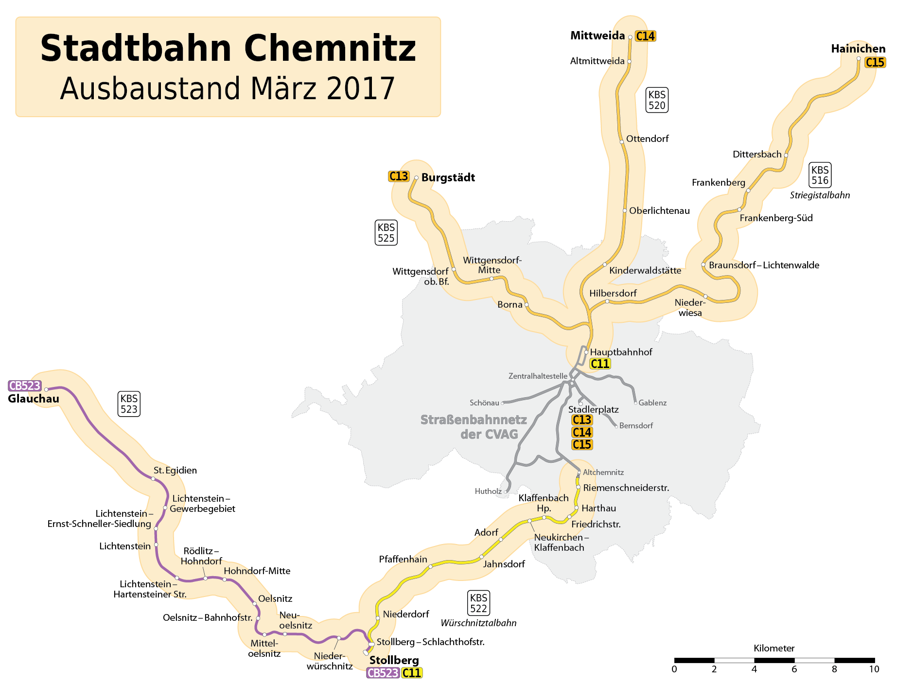 Karte: Aktuelles Liniennetz der City-Bahn Chemnitz